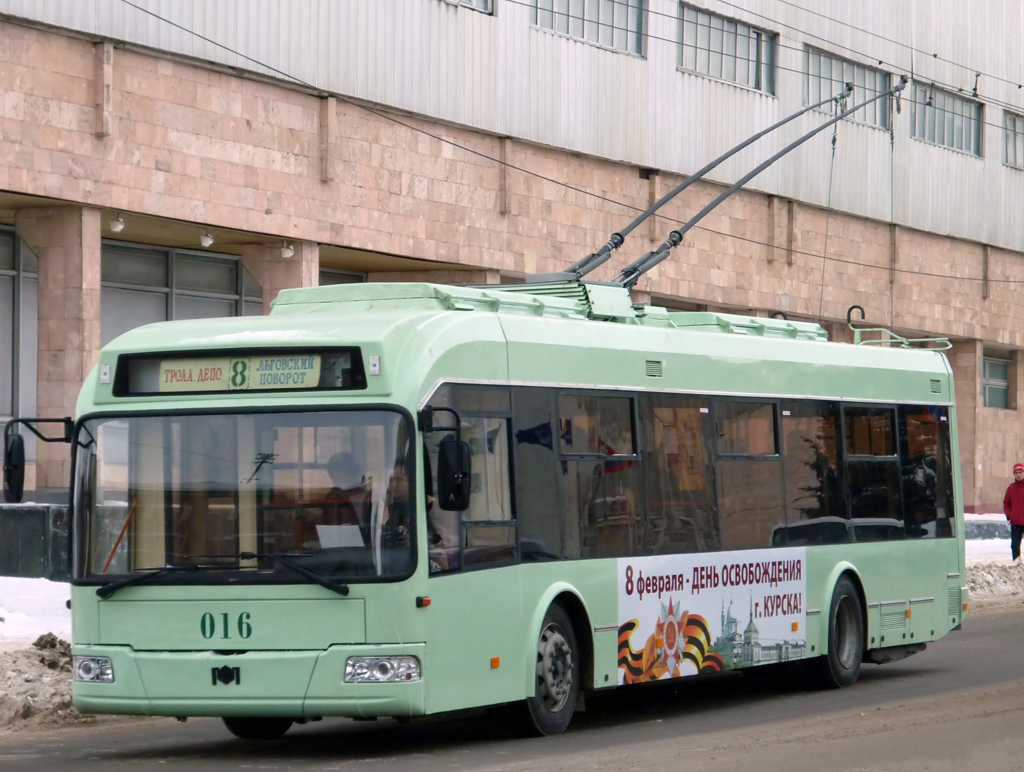 Троллейбус Белкоммунмаш-321 в городе Курске